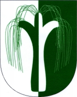 Mlečice, znak. Ve stříbrno-zeleně polceném štítě smuteční vrba opačných barev.